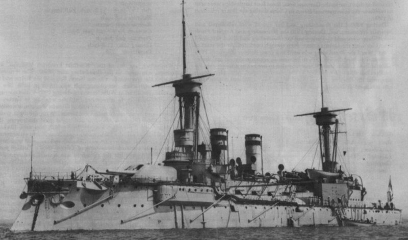 Schlachtschiff Weissenburg